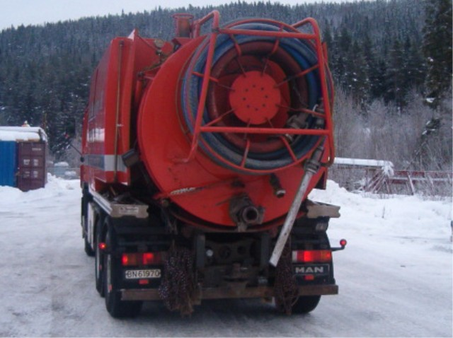 slamsuger